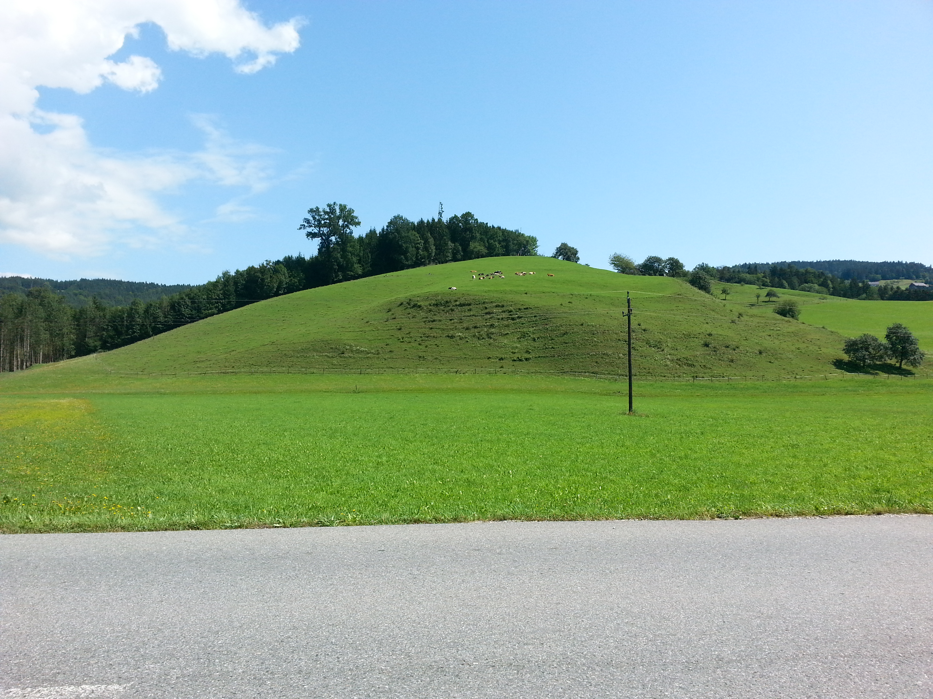 Das Grundstück in Södingberg auf welchem bei Ausgrabungen die römerzeitliche Villa und das latènezeitliches Gehöft in Södingberg gefunden wurden.